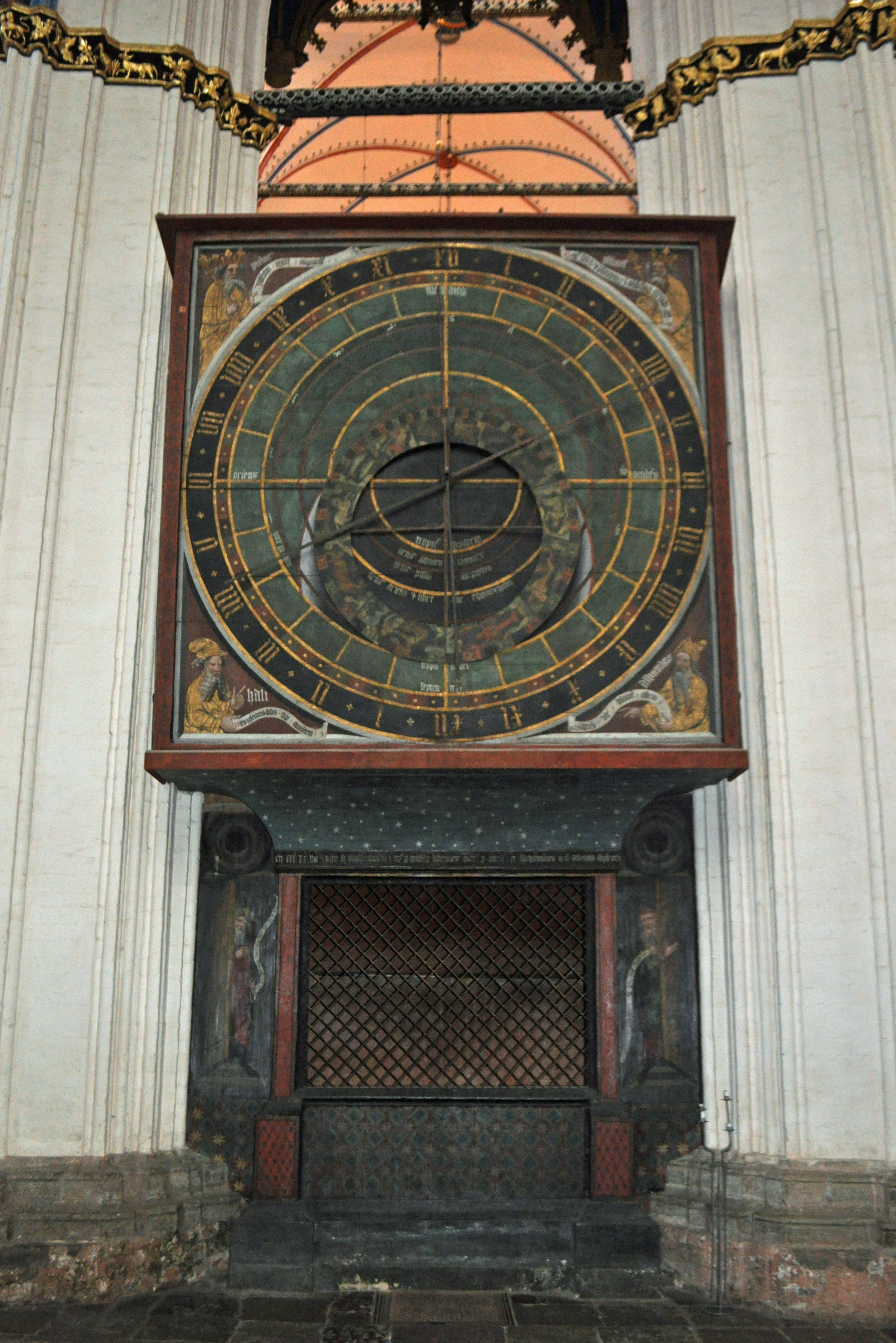 Stralsund, Nikolaikirche, Astronomische Uhr (2012-12-29) 1, by Klugschnacker in Wikipedia